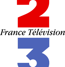 France TV 92 logo